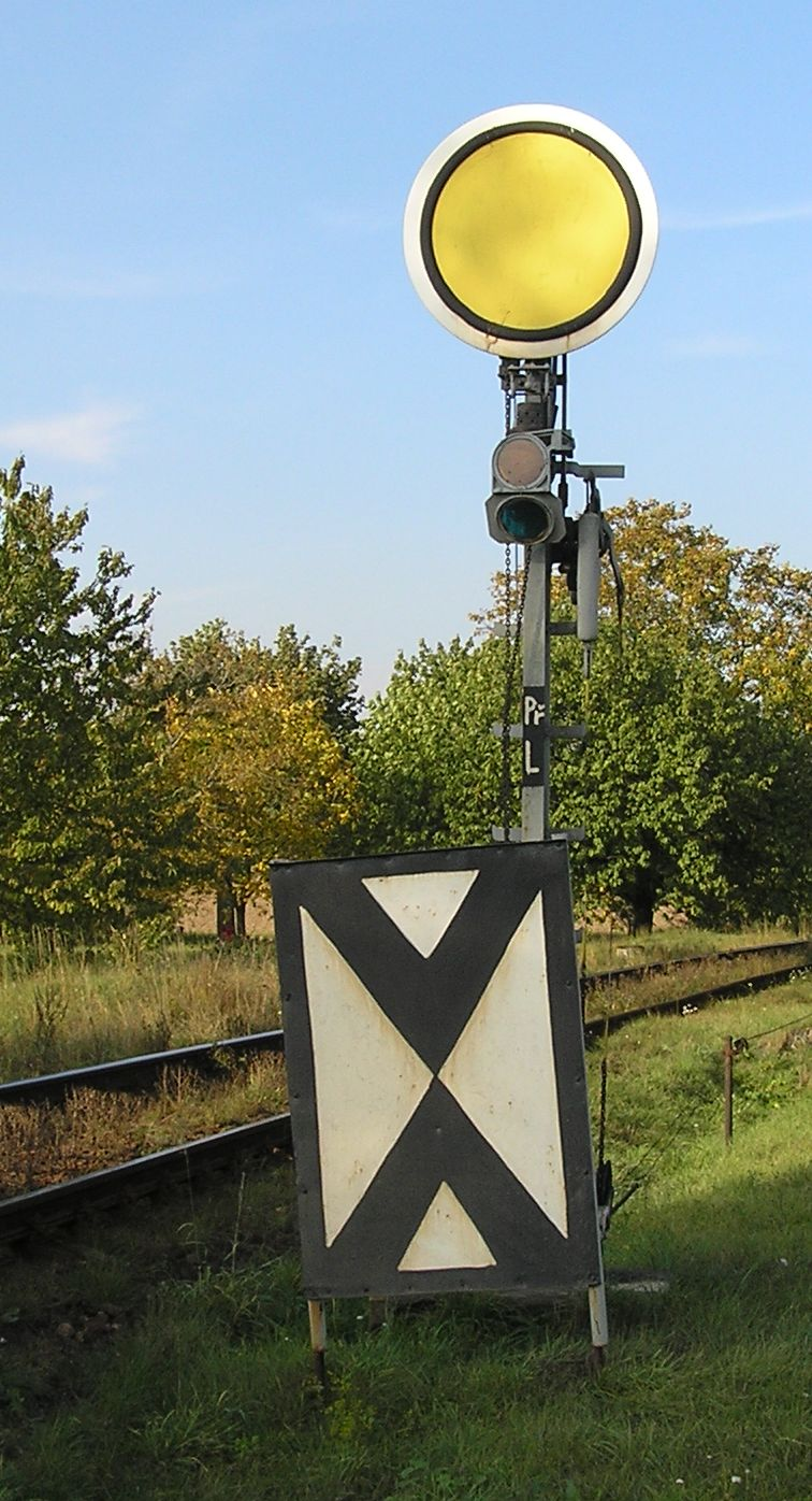 Dvouznaká mechanická předvěst s návěstí Výstraha (PřL stanice Bohuslavice nad Metují)